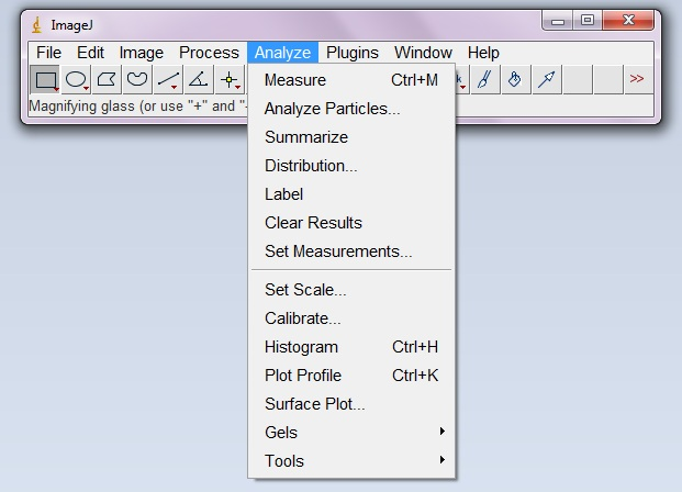 Herramientas de ImageJ